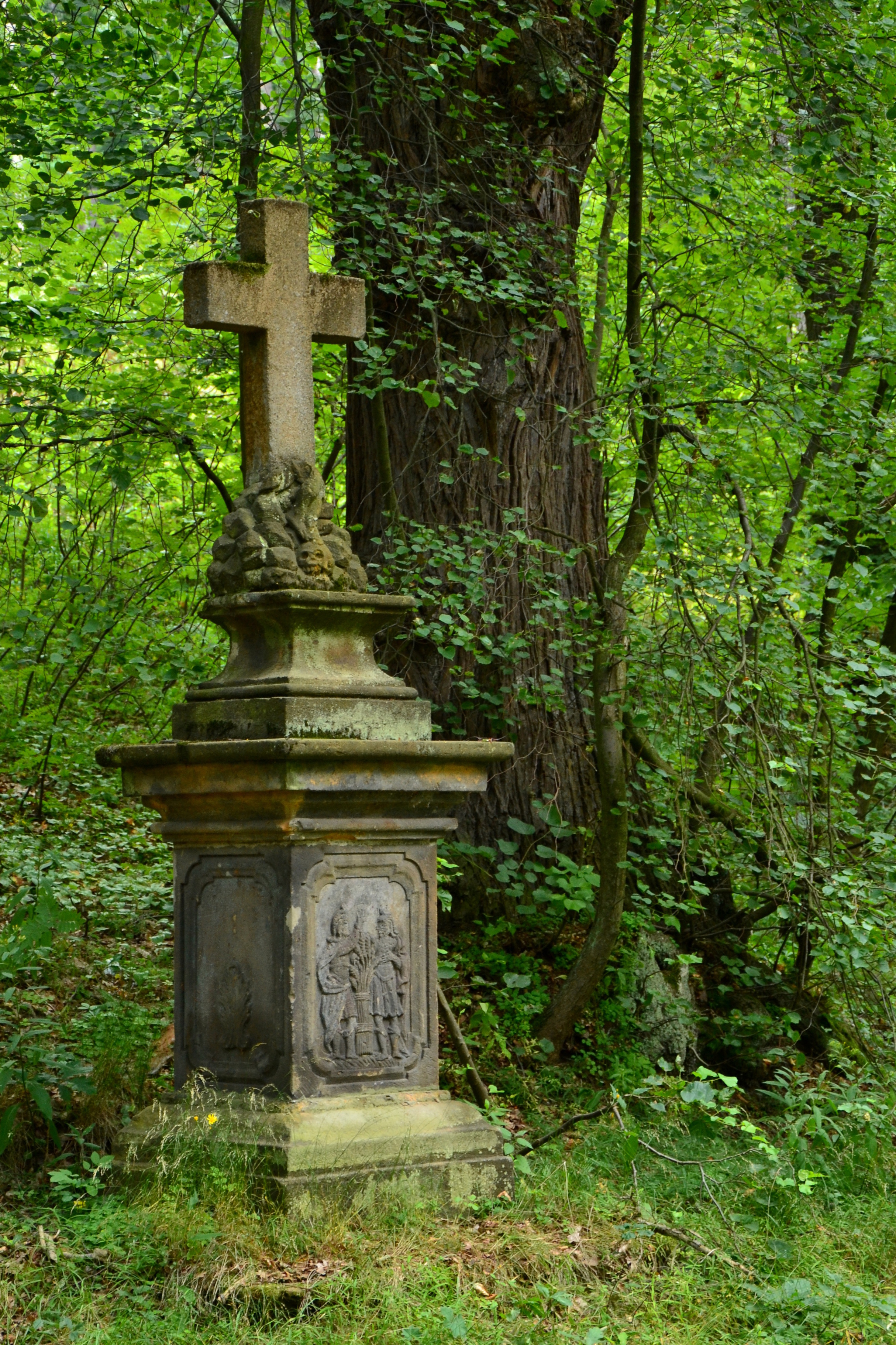 Blahuňov - kříž na kraji lesa u silnice k Chomutovu